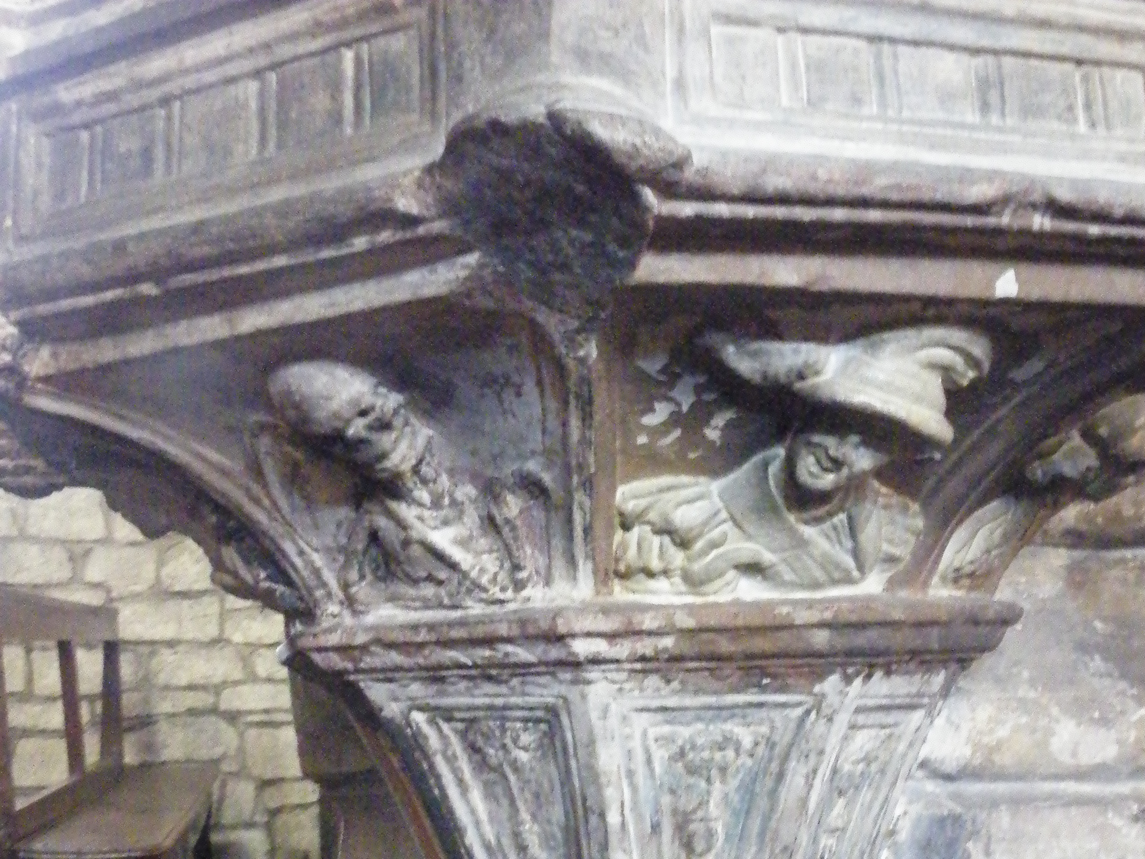 Soubassement de la chaire de l'église de Fontenoy-le Château